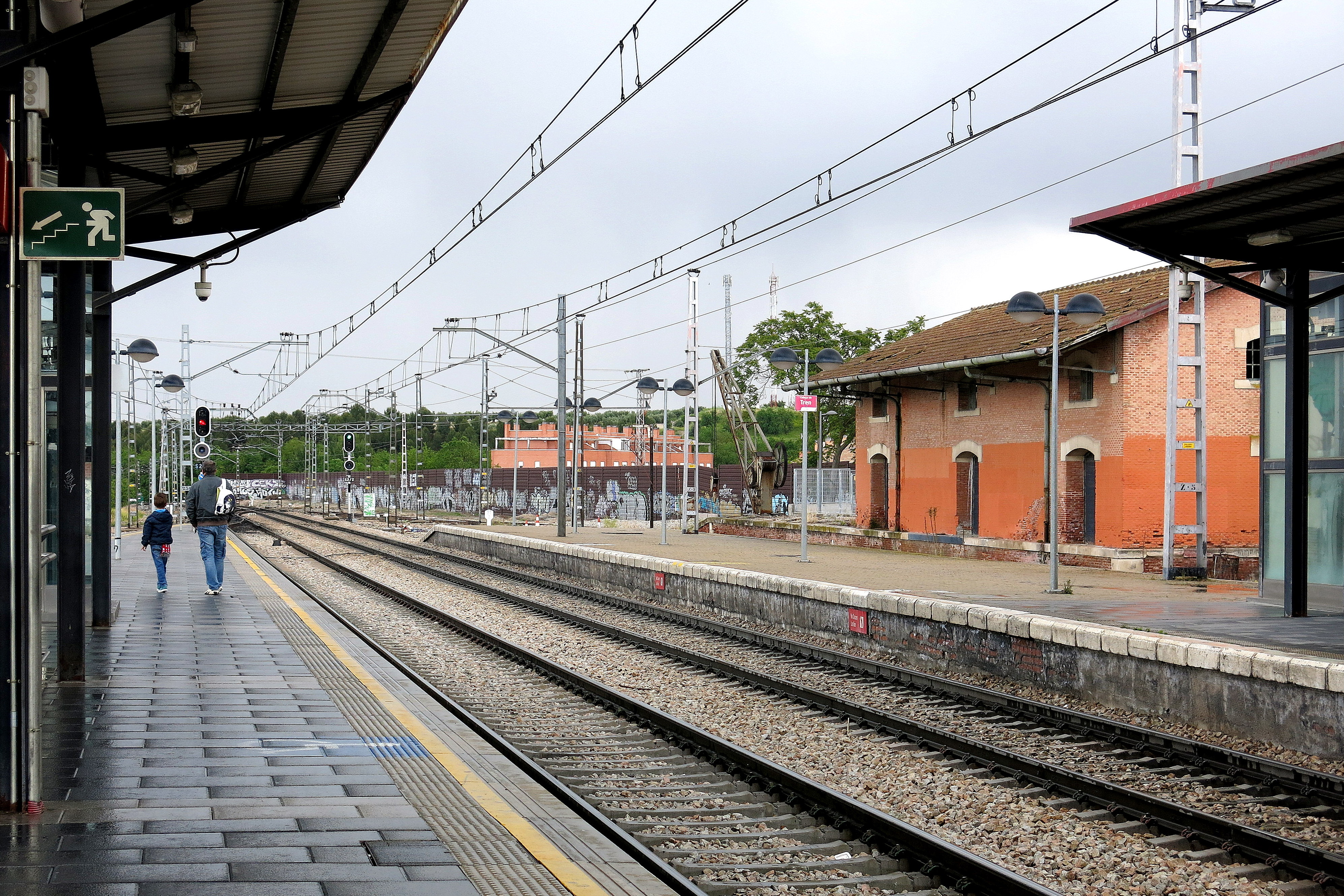 Estación de Valdemoro.